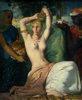 Ester valmistumas kohtumiseks Ahasverosega